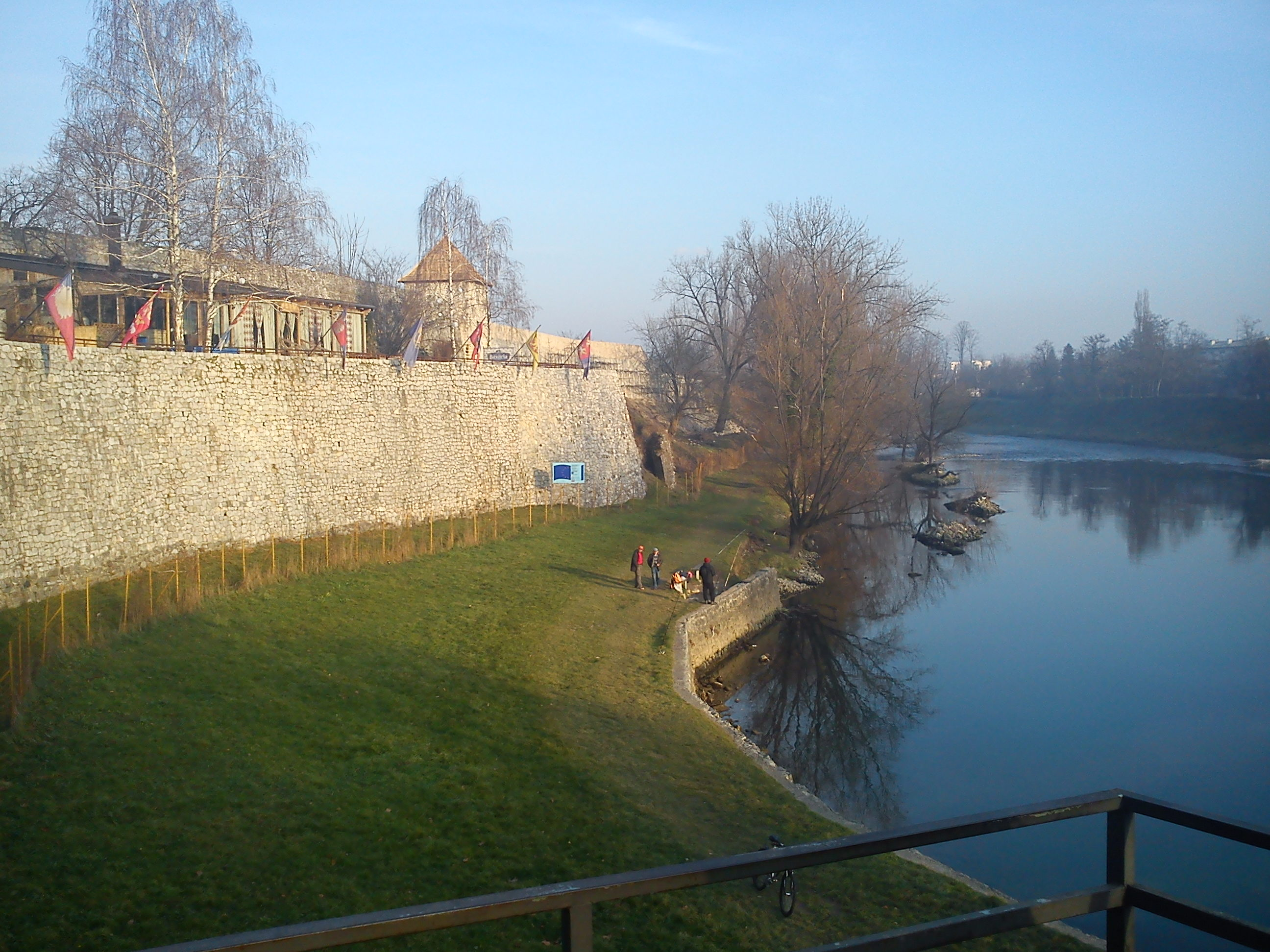 Тврђава Кастел Бања Лука